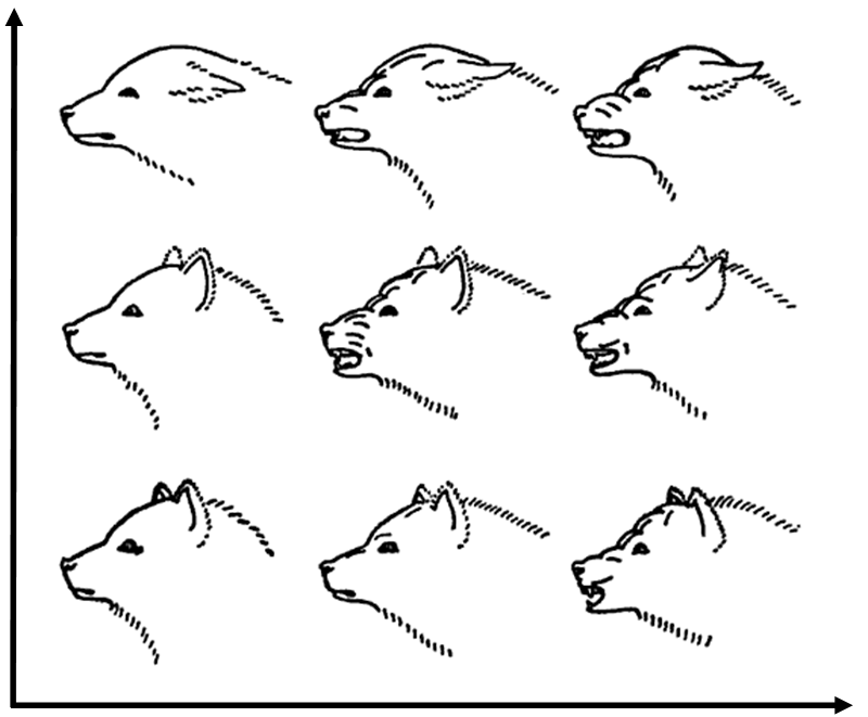 À partir d'Eibl-Eibesfeldt 1970, tiré originellement de Lorenz, 1952.粵語: 狼嘅各種表情；X 軸代表攻擊性，Y 軸代表恐懼，最右上角嗰個表情就係狼又驚又打算攻擊（例如俾敵人趕咗入死角）嗰時嘅表情。參考 Lorenz, 1952。